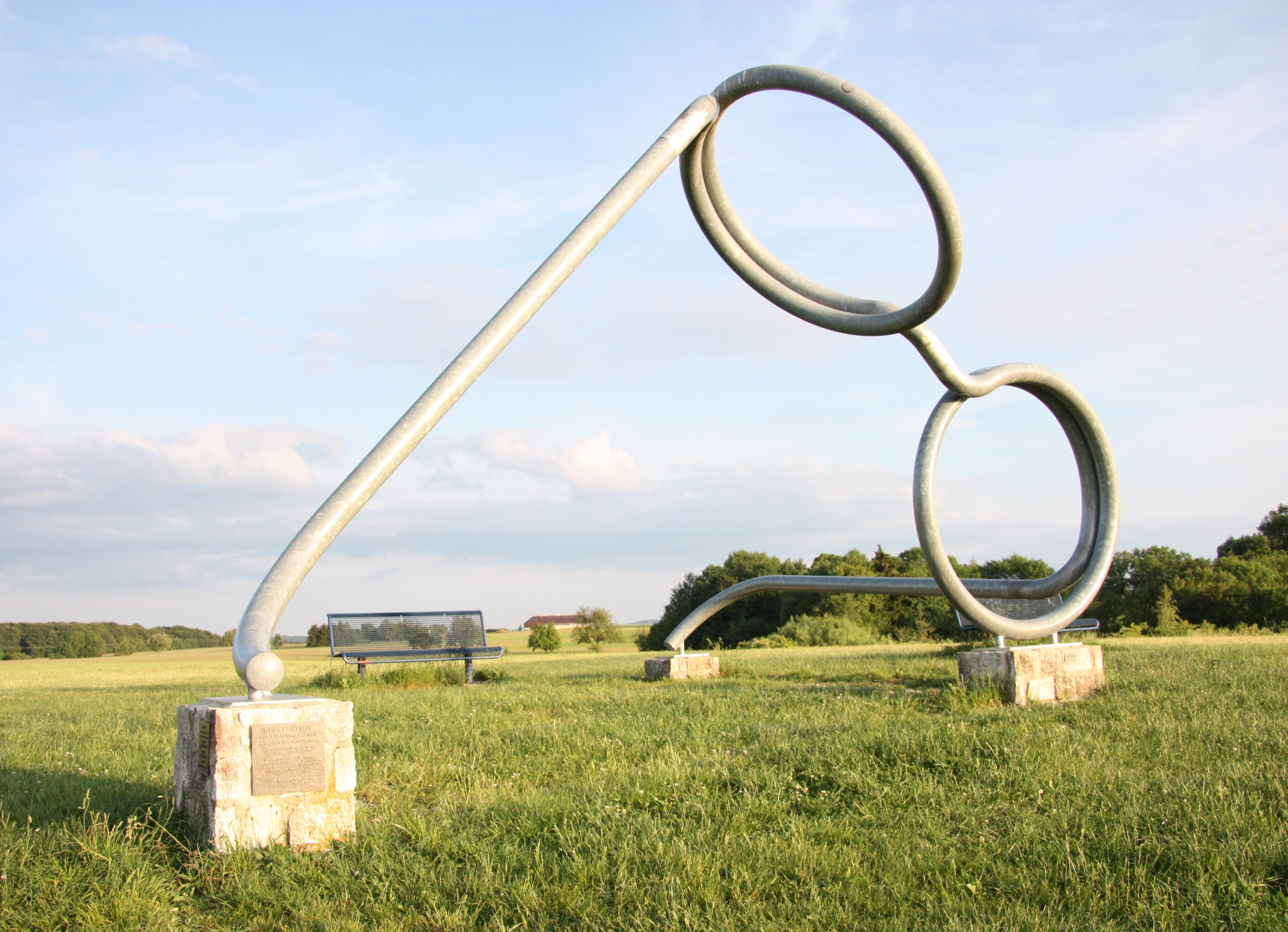 Das Kunstobjekt „Brille“ des Künstlers Karl Schwarz aus dem Jahr 2000 nördlich von Hülben.